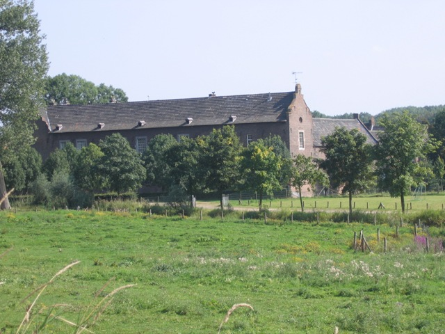 Kasteel Terborg. Foto gemaakt door Han Verbiesen.